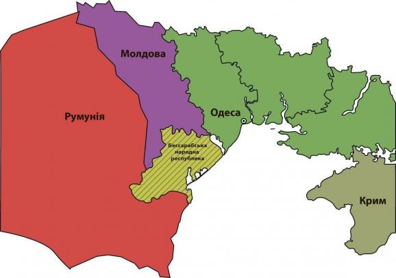 Карта "Бесарабської Народнаї Республіки"